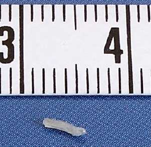 Made der Goldfliege Lucilia sericata